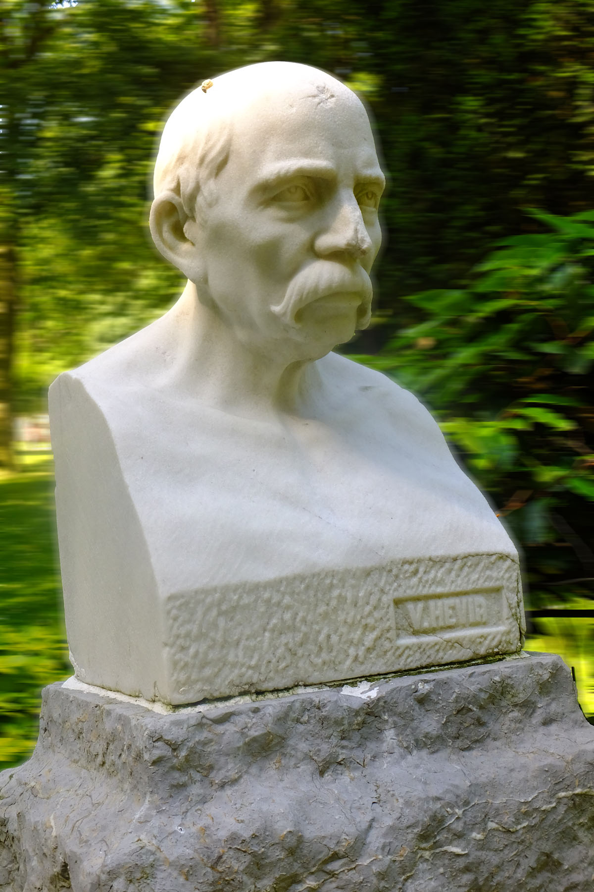 Desenfoque